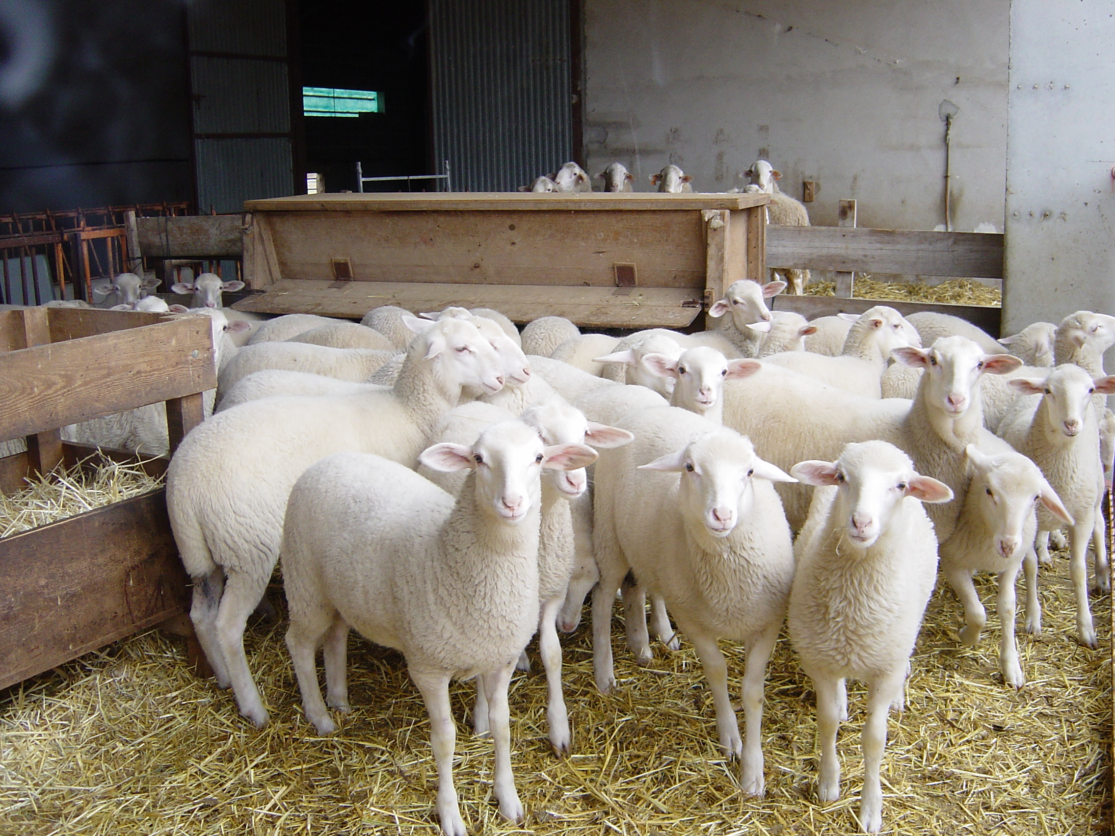 Explotació ramadera